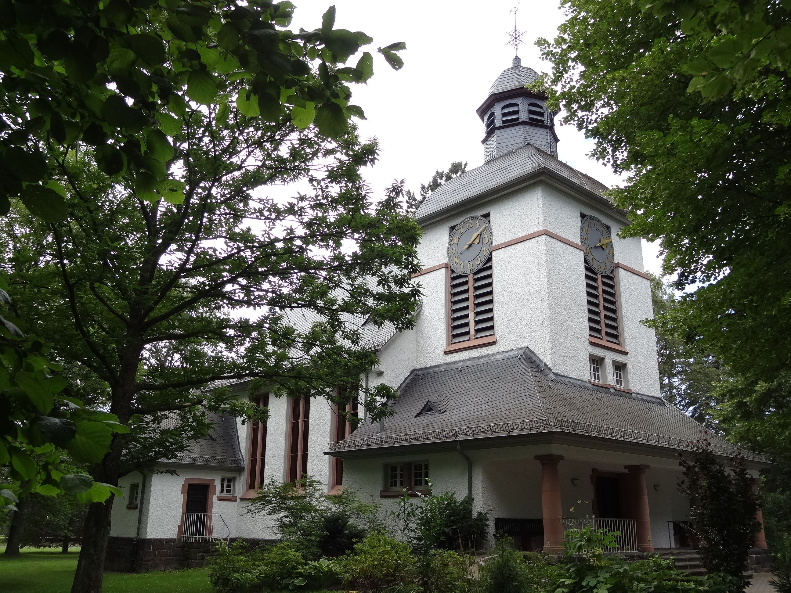 Kapelle in den VITOS-Kliniken für Psychiatrie